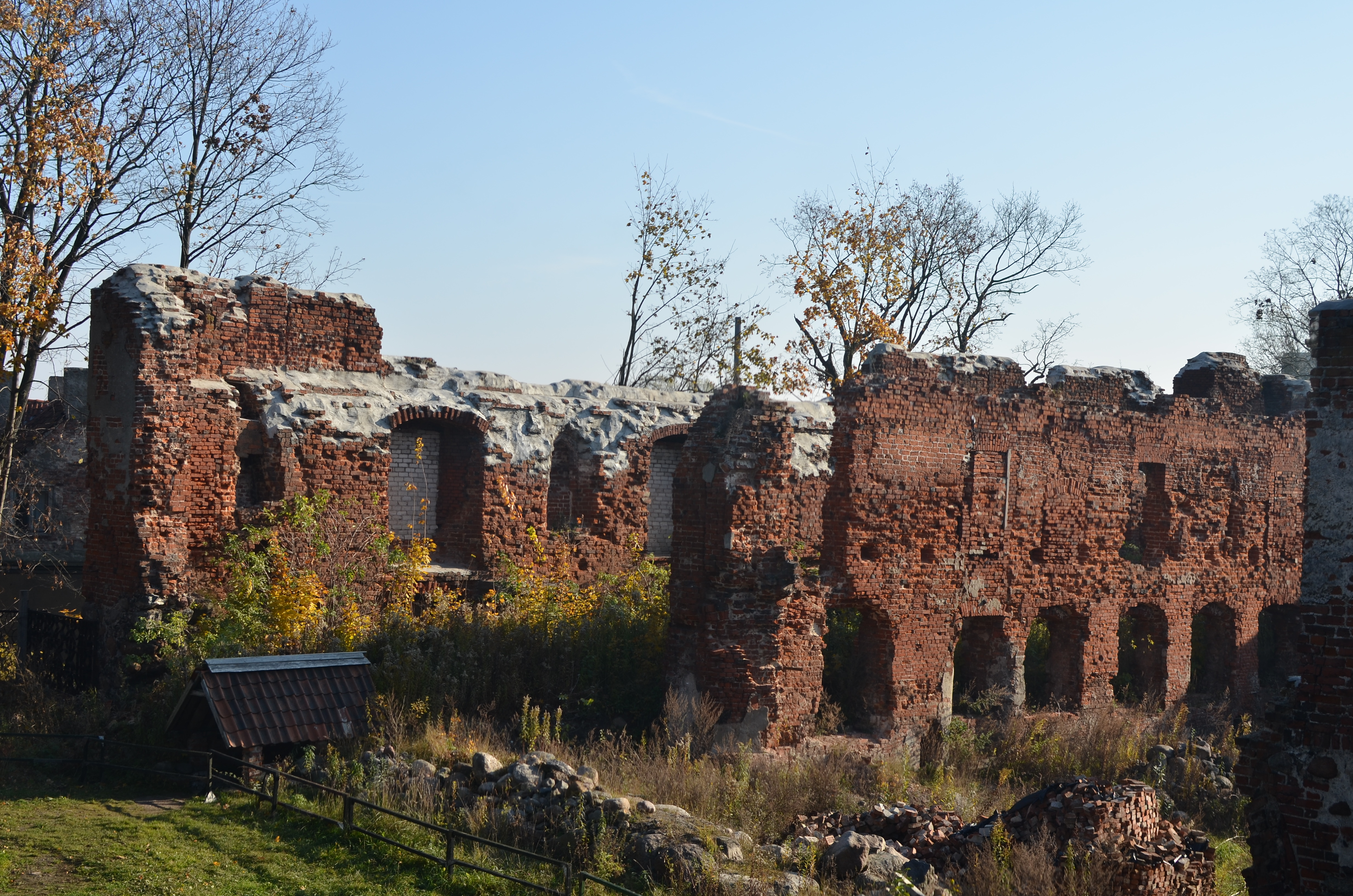 Архитектурный ансамбль Инстербург (замок) (Калиниградская область, Черняховск, город Черняховск)